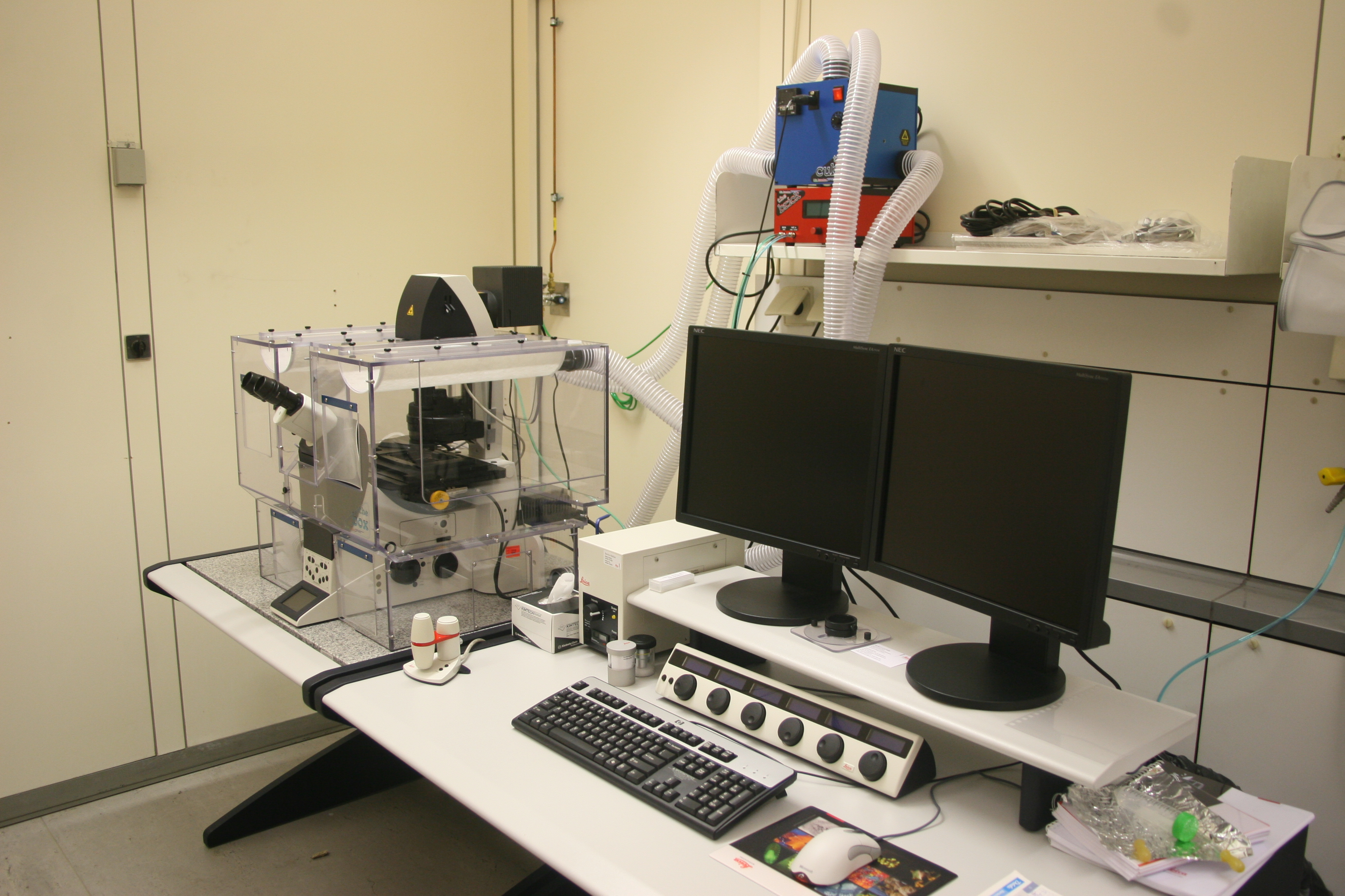 Konfokalmikroskop im Theoretikum der Ruprecht-Karls-Universität Heidelberg - IPMB - Institut für Pharmazie und Molekulare Biotechnologie, Abteilung: Pharmazeutische Technologie